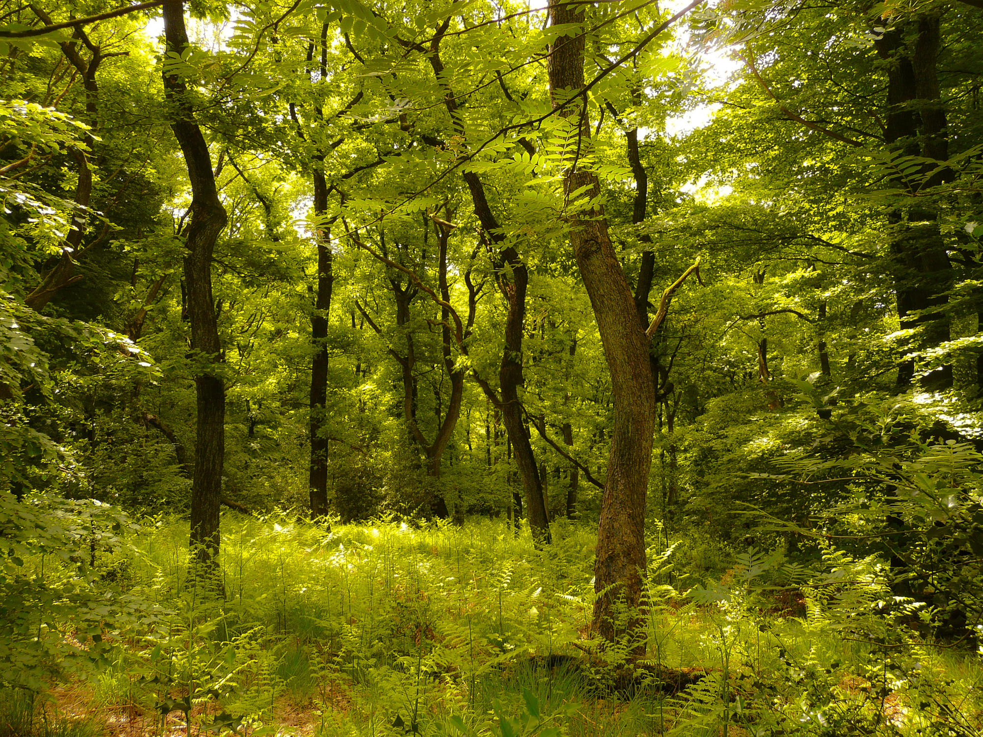 Bezaubernder naturnaher Eichenwald im NSG Gevelsberger Stadtwald